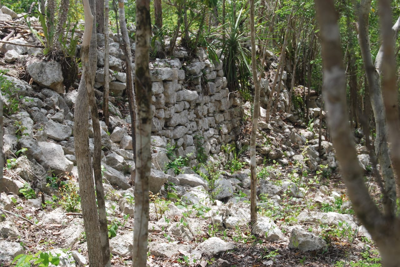 pirámide maya